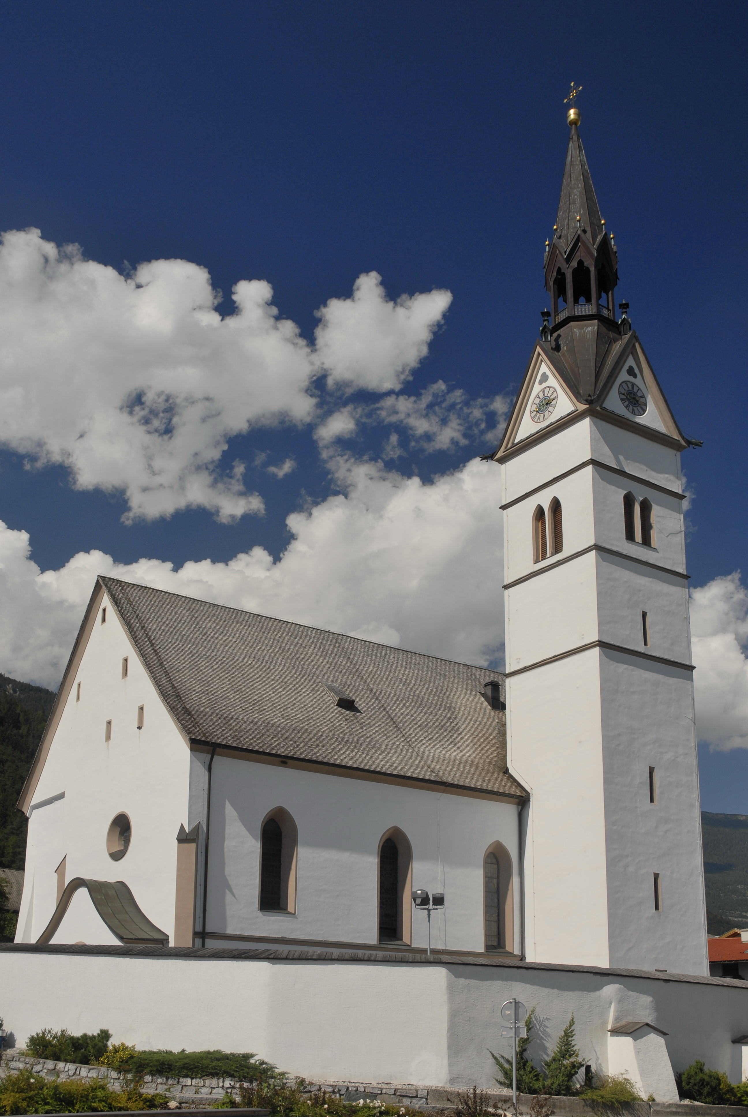 Pfarrkirche Petrus und Paulus, Vomp